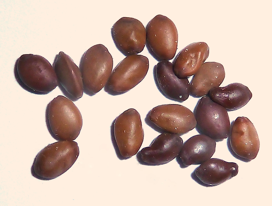 Cercis siliquastrum (Árbol del amor) - Semillas sueltas - Ornamental/cultivado, Calle Rufino Blanco, Madrid (España).